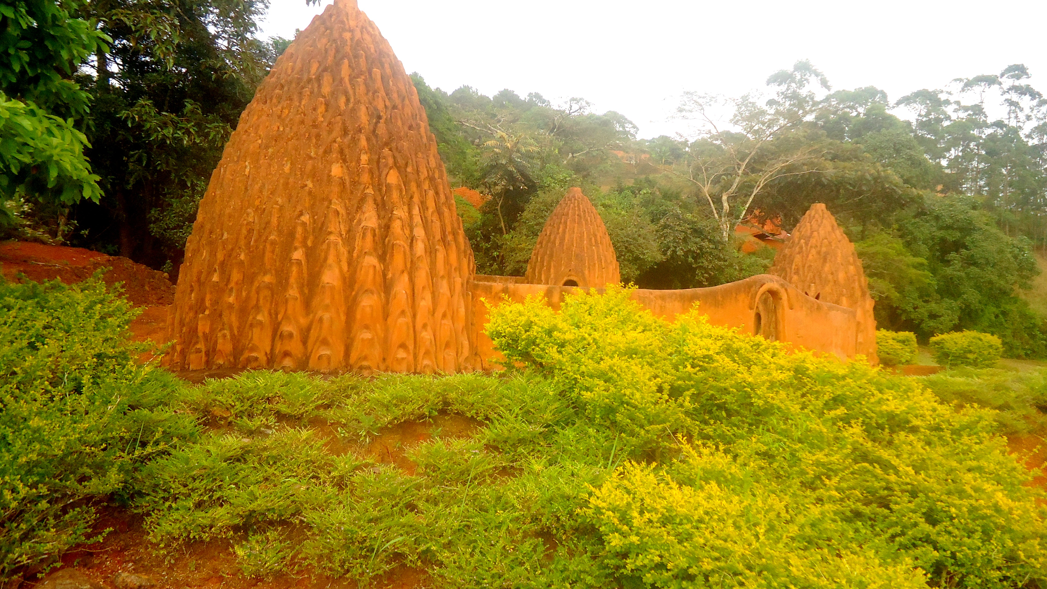 Cette image représente des cases Mousgoum, ce peuple des plaines du Nord-Cameroun du Sud-ouest du Tchad et de l'Est du Nigéria. Faites en boue séchée, elles sont reproduites ici à la Fondation Jean Félicien Gacha à Bangoulap, dans la région de l'Ouest.